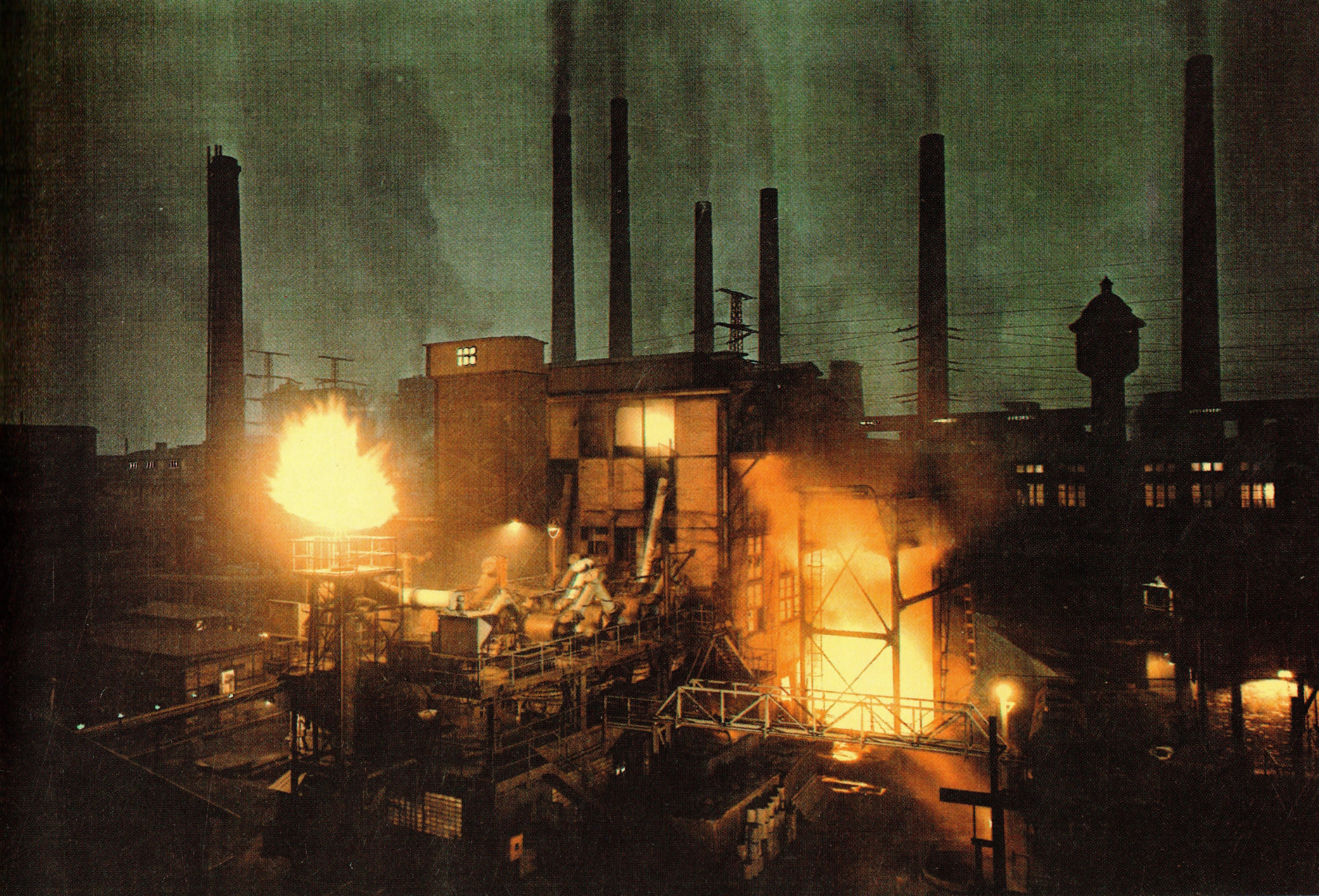 Schlackenabstich im Phosphorofen des CKB